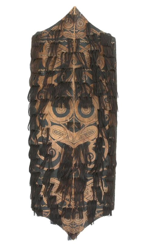 Schild. Houten schild versierd met mensenhaar Unknown language: Kelebit bok